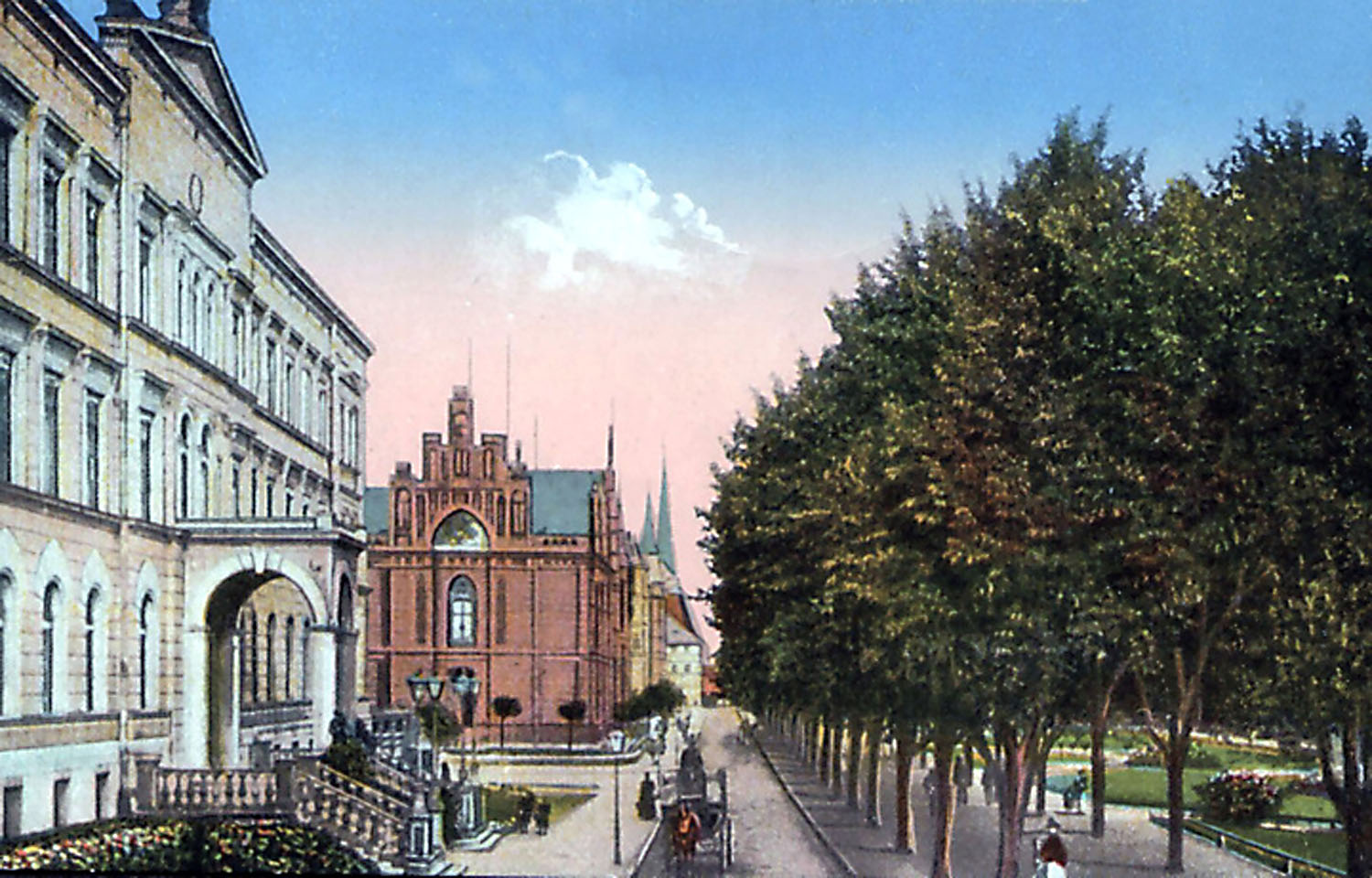 Rostock Wallpromenade